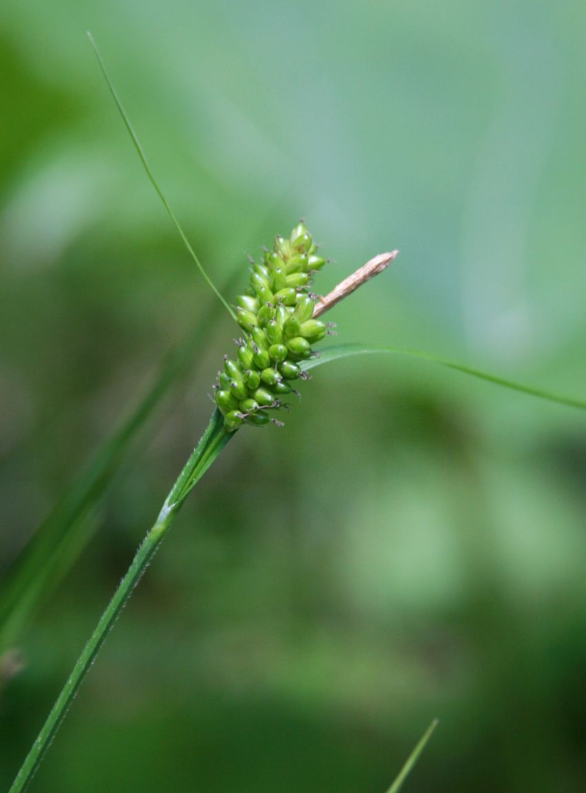 Bleich-Segge (Carex pallescens), Sauergräser (Cyperaceae) - Österreich/Austria/Autriche: Oberösterreich, Hausruckviertel, ca. 2.3 km NE Forsthaus Redltal, ca. 690 m s.m.